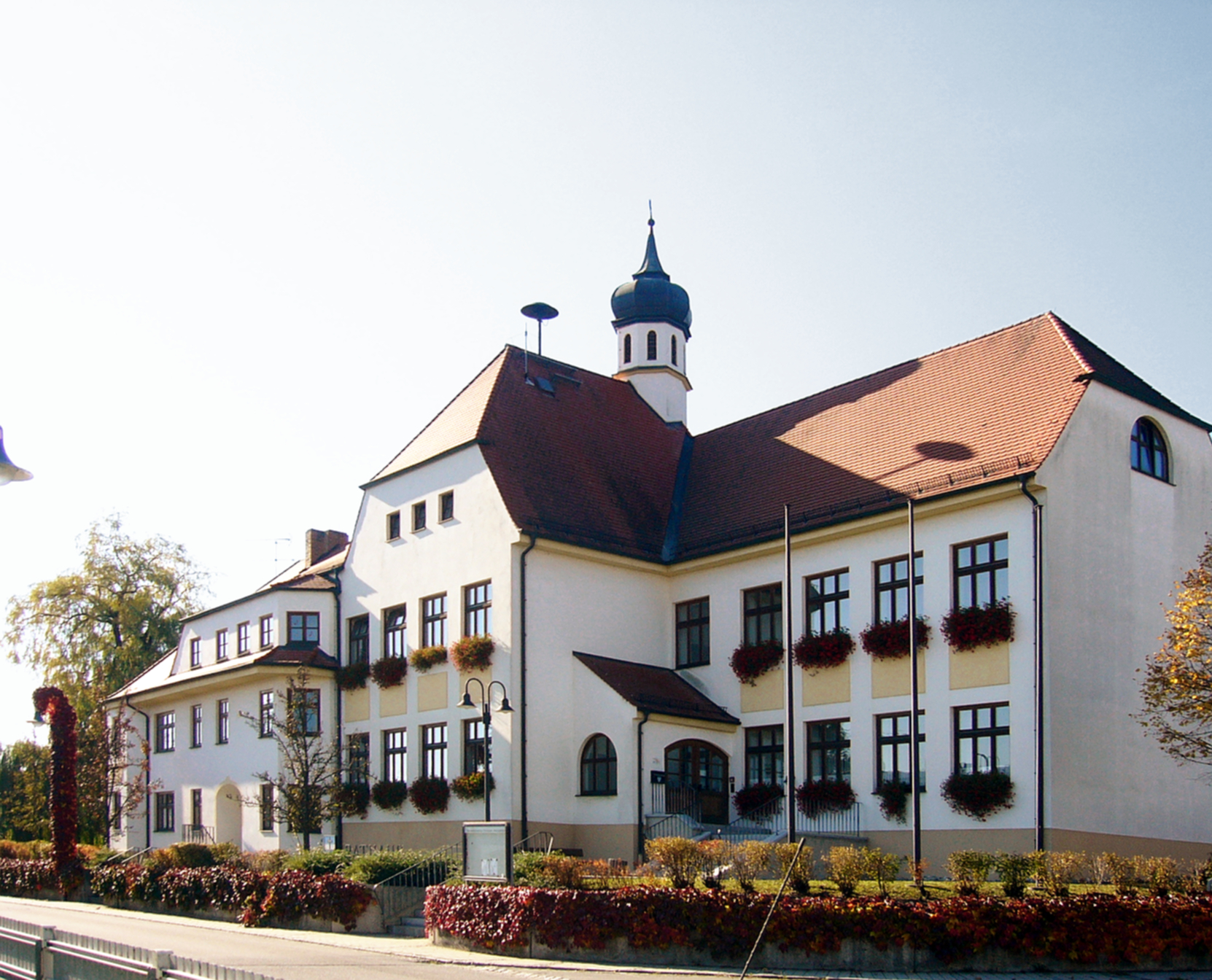 Rathaus von Johanniskirchen, Landkreis Rottal-Inn, Bayern